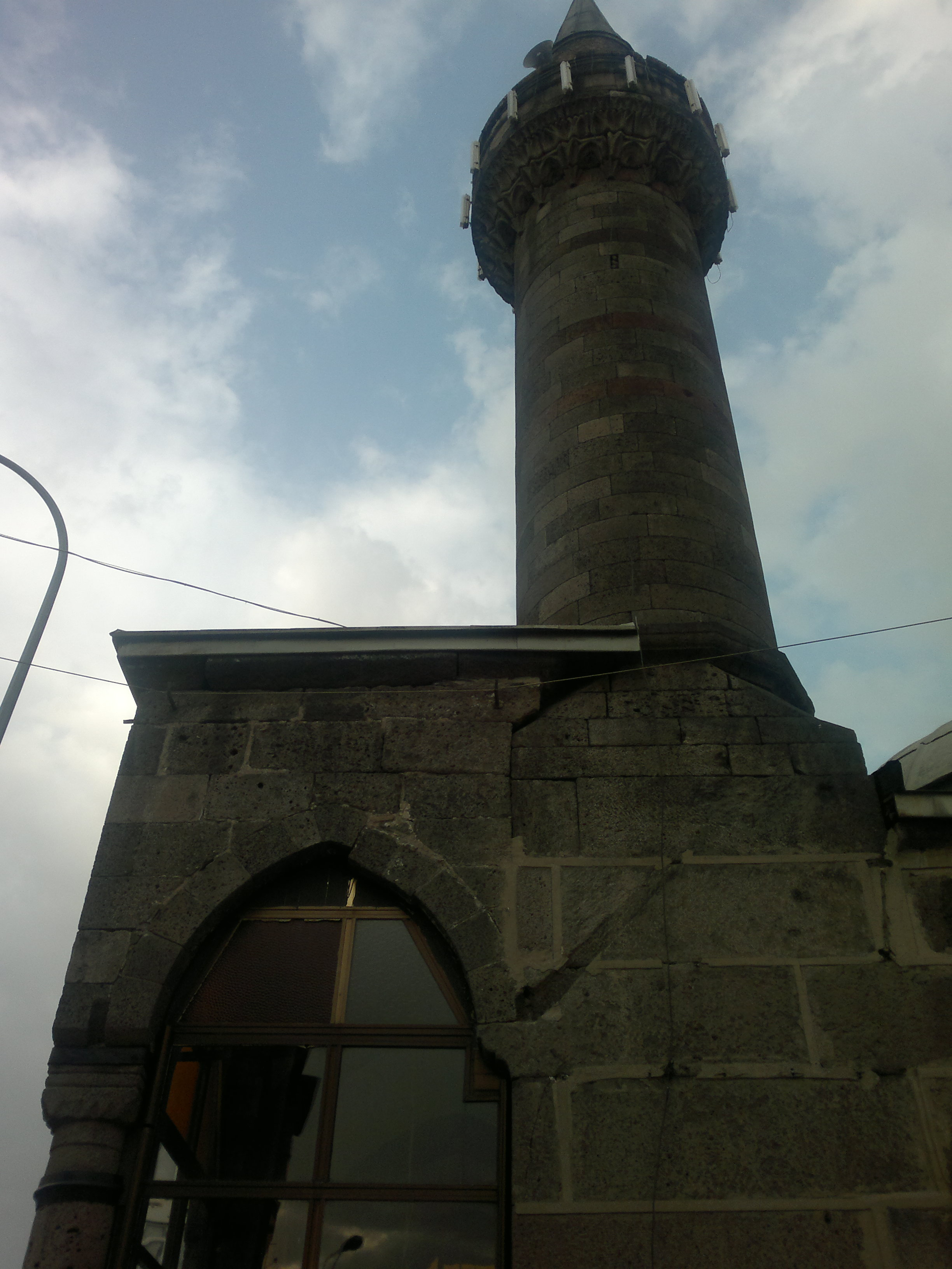 Erzurum Pervizoğlu Camii